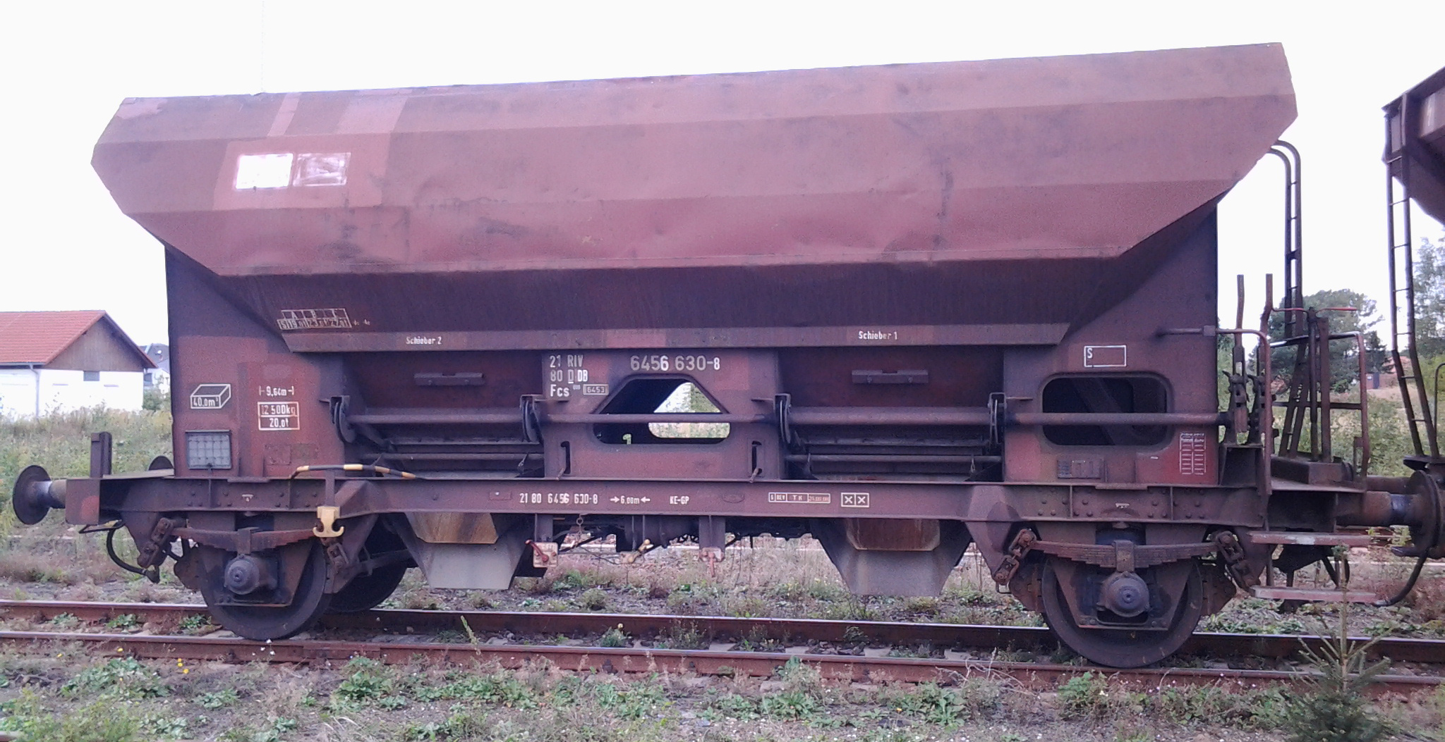 Offener Trichterwagen für den Einzelwagenverkehr als Fcs 088 der DB, ex Fcs 6453 der Deutschen Reichsbahn, Dok.-Nr. 5201, französische Bauart mit trapezförmigem Ausschnitt